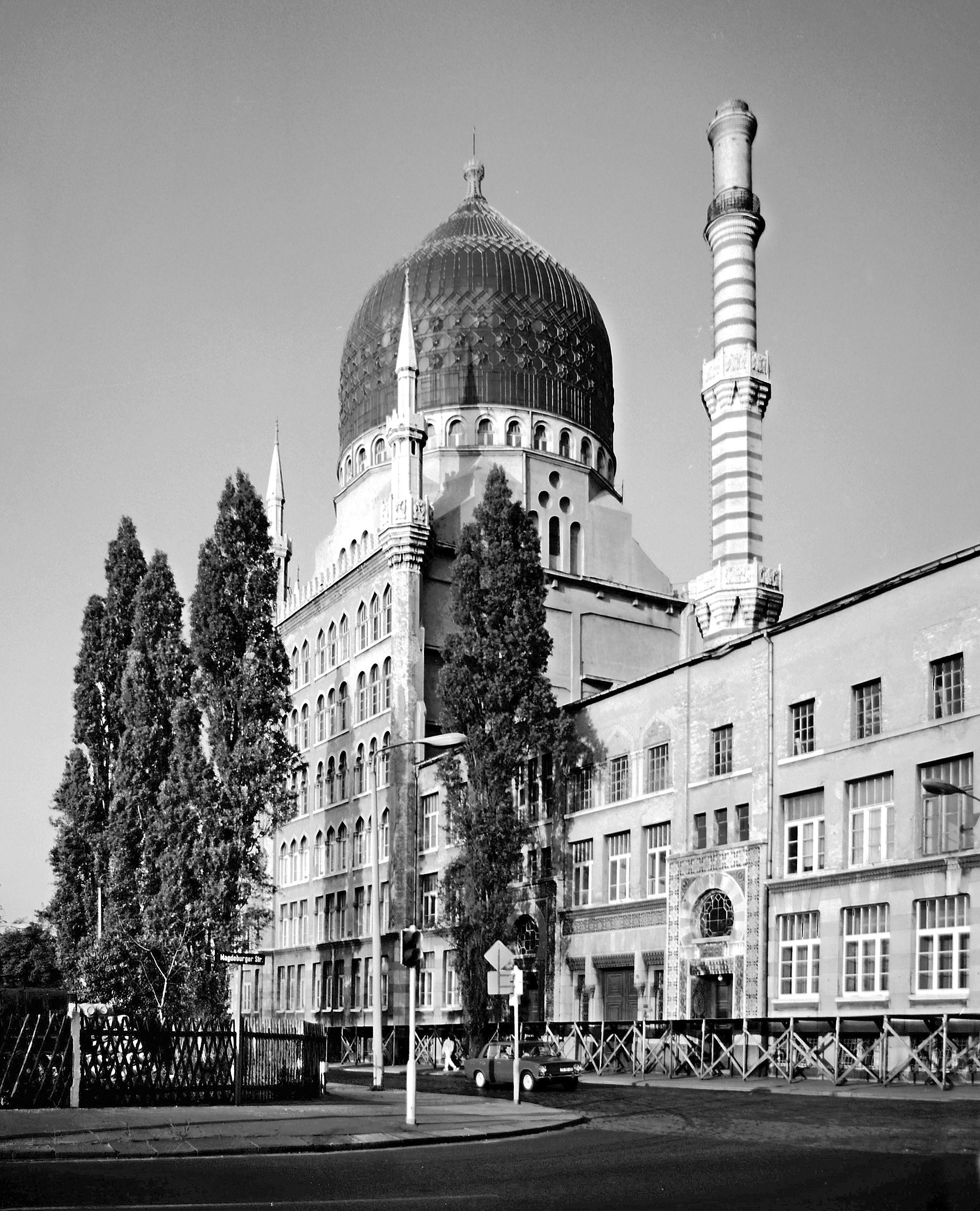 11.05.1988 Dresden-Friedrichstadt: "Orientalische Tabak- und Cigarettenfabrik Yenidze" (1907-12 von H. M. Hammitzsch für Hugo Zietz). Weißeritzstraße 3. [R19880511E0007.jpg]19880511710NR.JPG(c)Blobelt